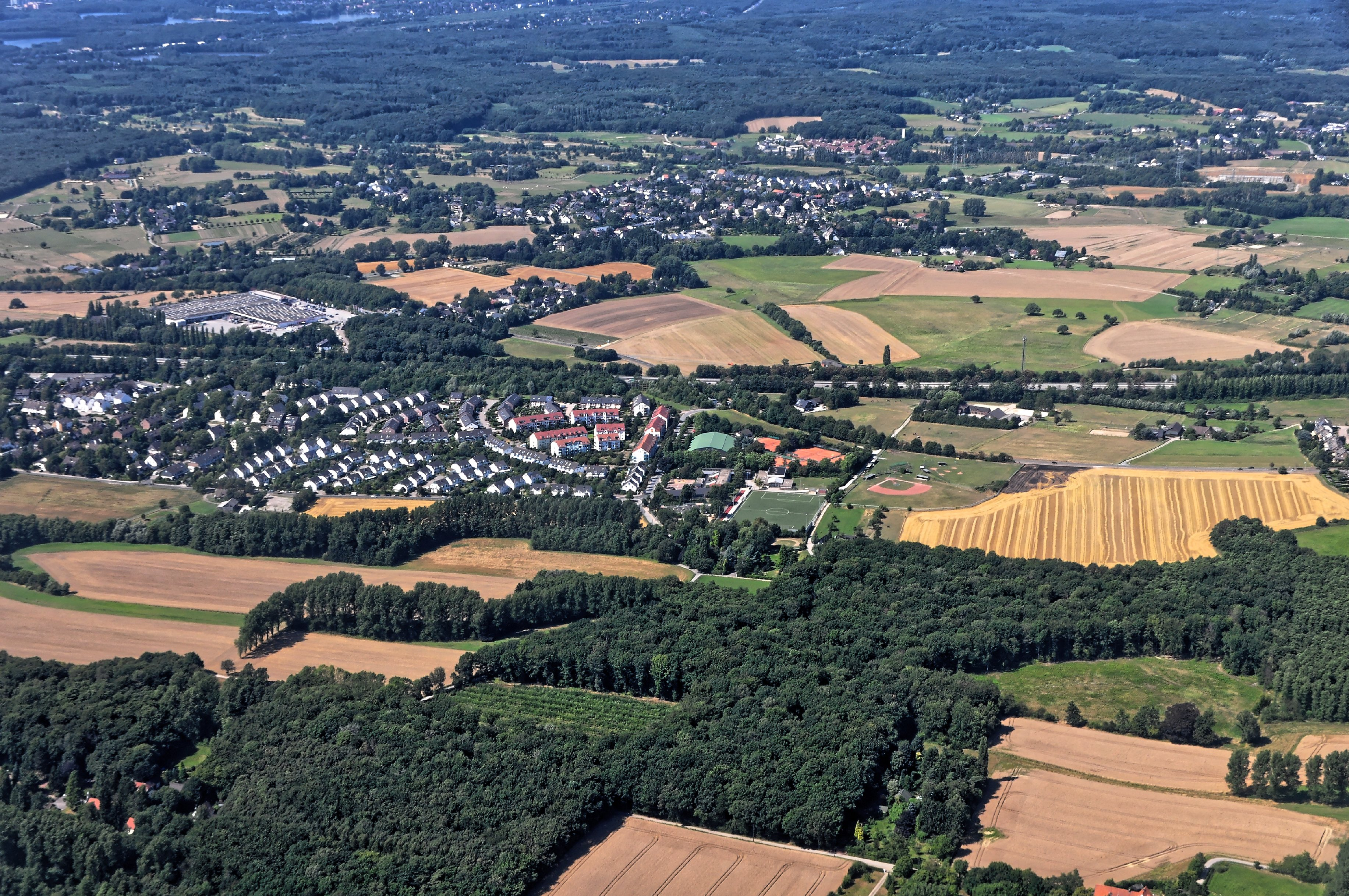 Bilder vom Flug -Rom-Düsseldorf-Hamburg 2013: Ratingen-Breitscheid an der A52